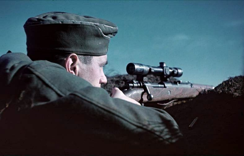 Scharfschütze in seiner Stellung, September 1942, 6. Armee vor Stalingrad.